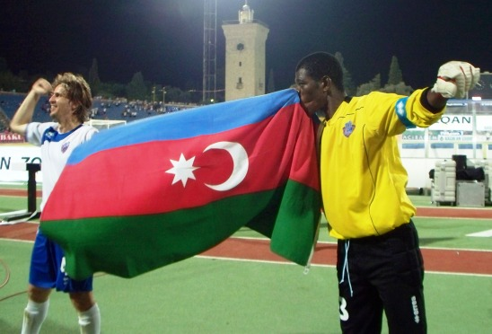 после матча Бакы-Экранас